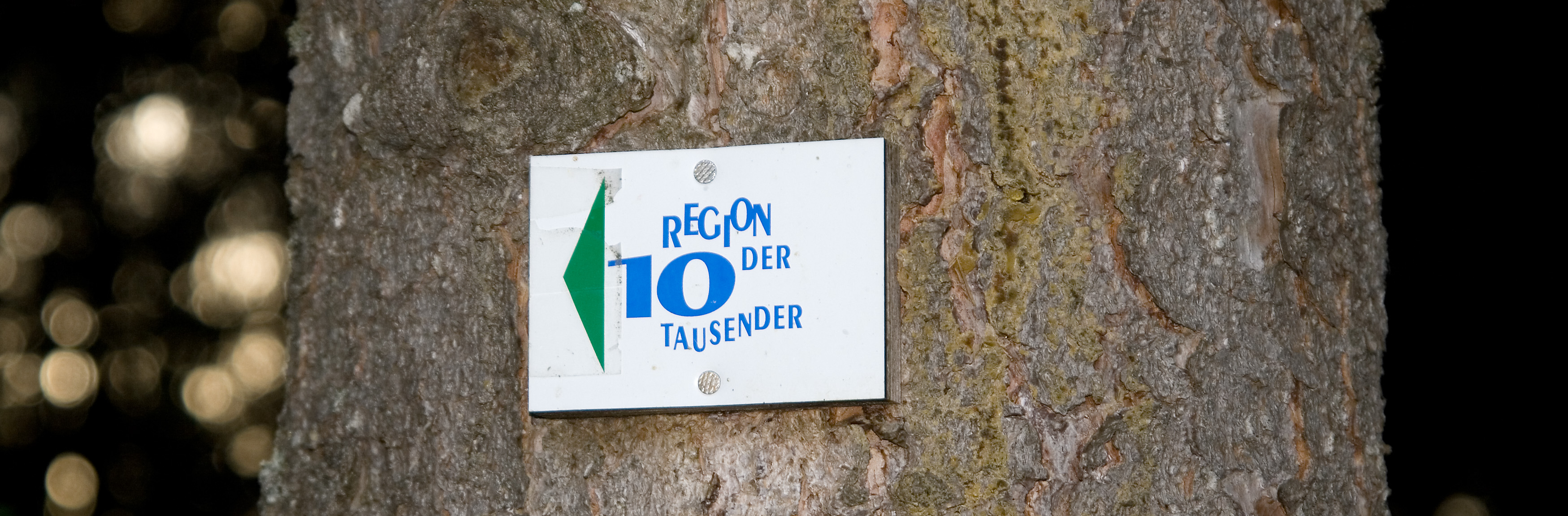 Das Logo der "Region der 10 Tausender" als Wegweiser an einem Baumstamm